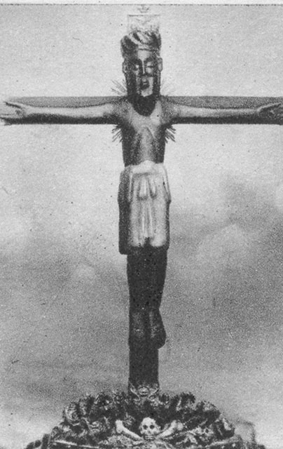 El Cristo del Cid - Salamanca - España Turística y Monumental / Cuarto álbum / Las Bellezas de Castilla / Región Leonesa - Cromo 50 x 70 Sepia